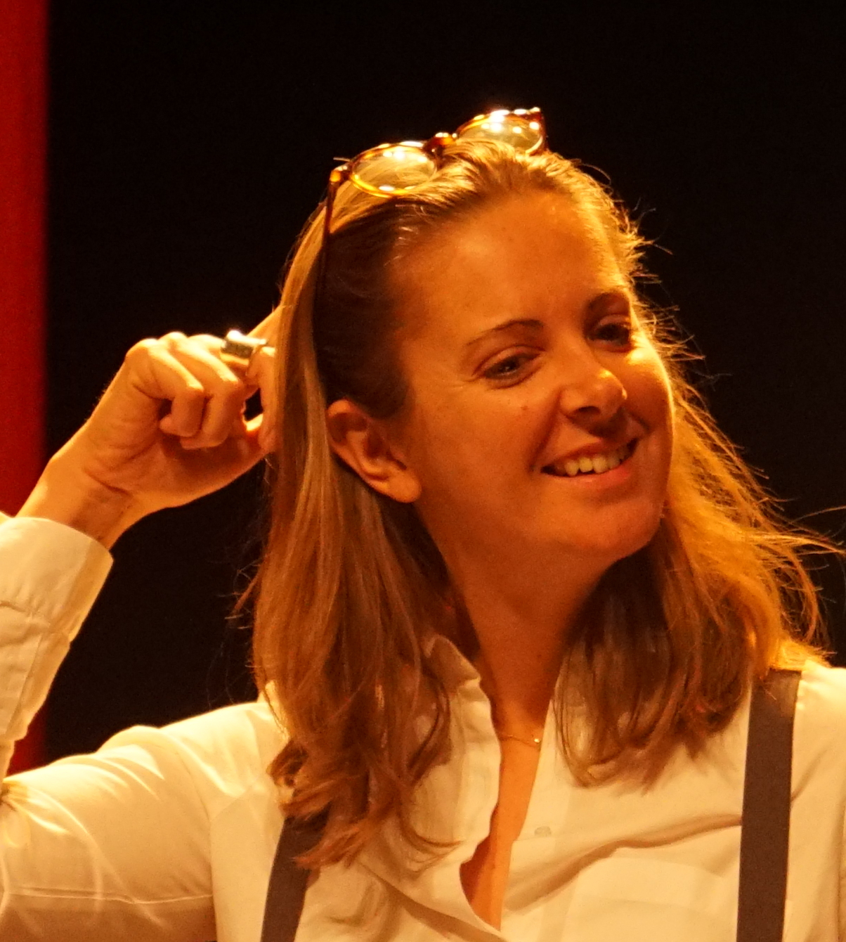 lors des Nuits de Champagne en 2016.